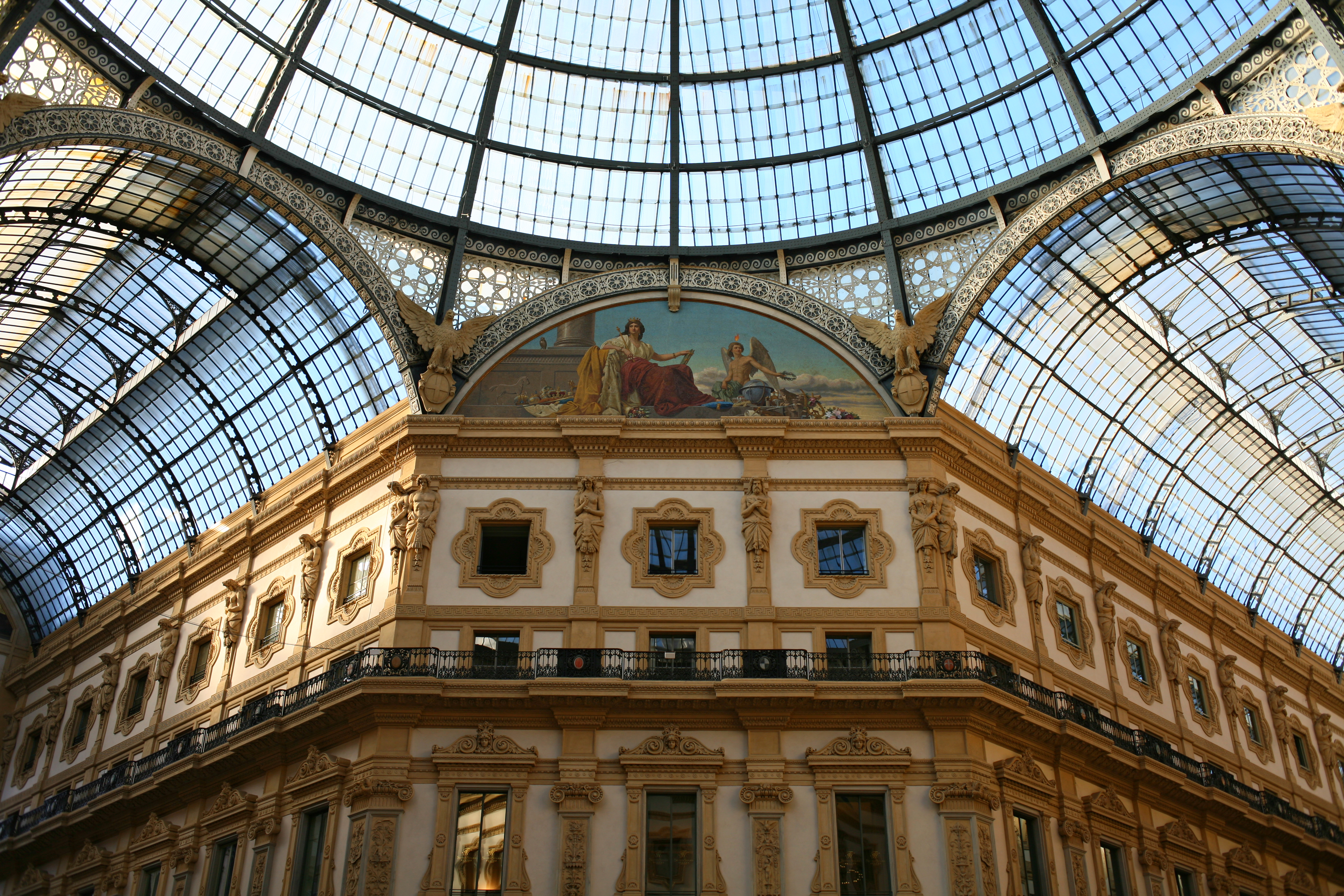 Galleria Vittorio Emanuele II - cupola